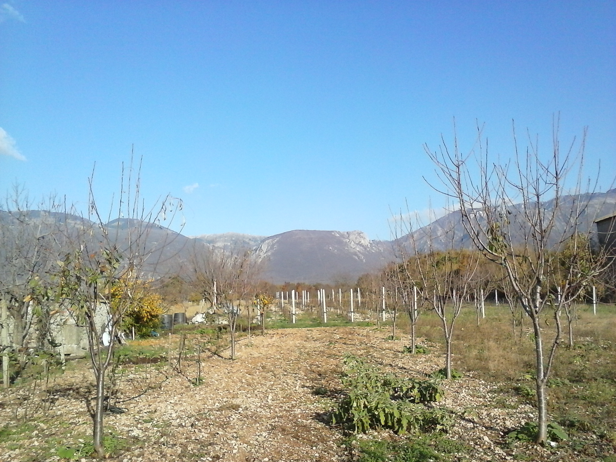 Imanje u selu Željuša